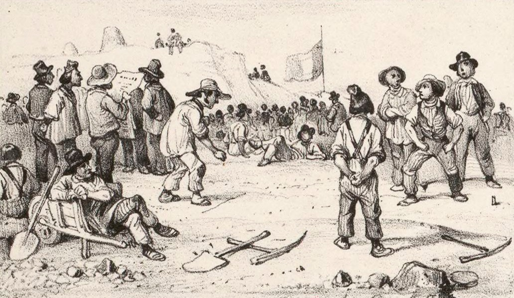 "Ateliers Nationaux". Détail de : Calendrier pour 1850 et 1851 avec illustrations des principaux événemens qui se sont passés en 1848 et 1849, Paris, Fatout, 1849.